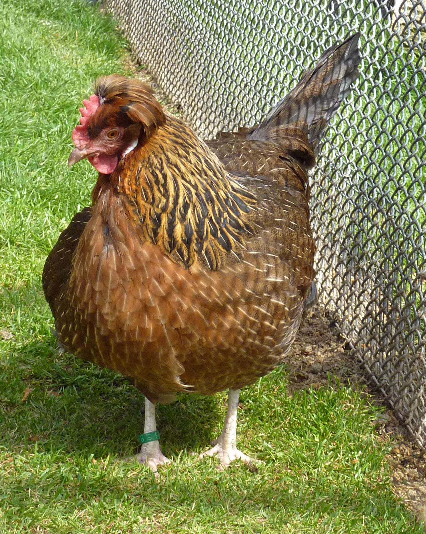 im Schaubauernhof der Wilhelma